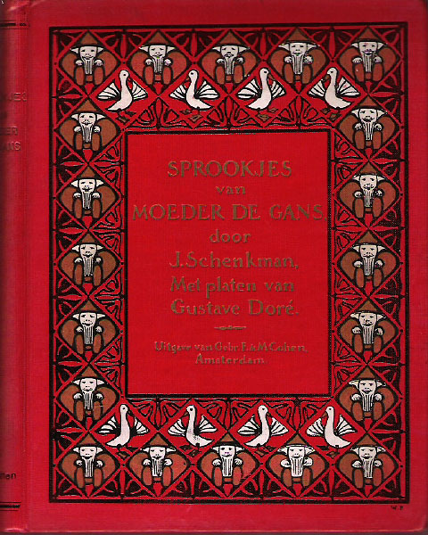 Boekomslag: Sprookjes van Moeder de Gans. Auteur: [:nl:Jan Schenkman]. Bandontwerp: Gustaaf van de Wall Perné. Uitgeverij: Gebroeders E. & M. Cohen.